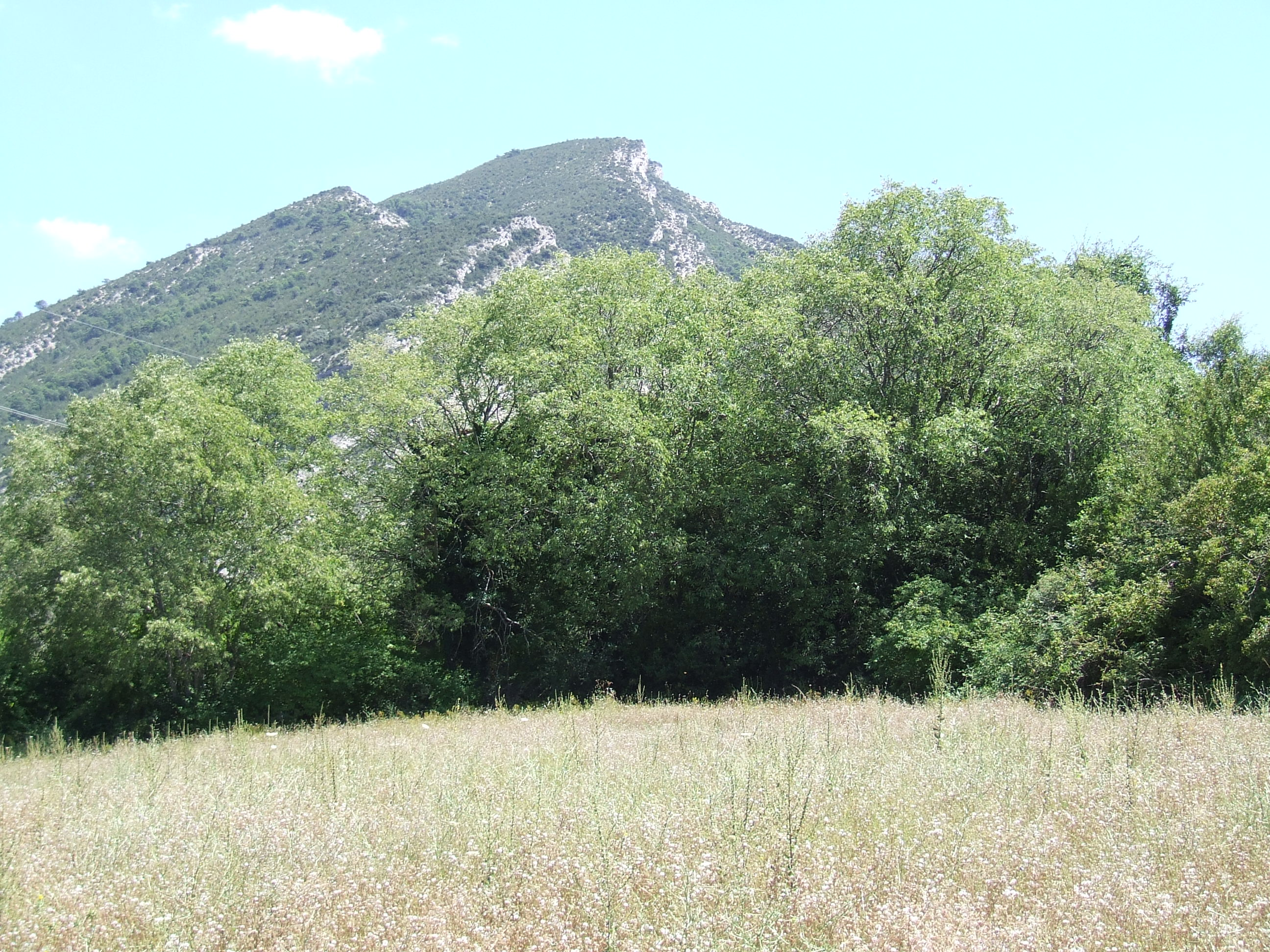 Casa Boer, a Vilanoveta (Hortoneda de la Conca, Conca de Dalt, Pallars Jussà)